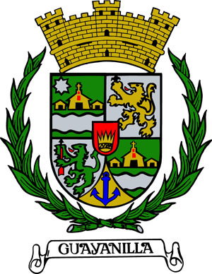 escudo